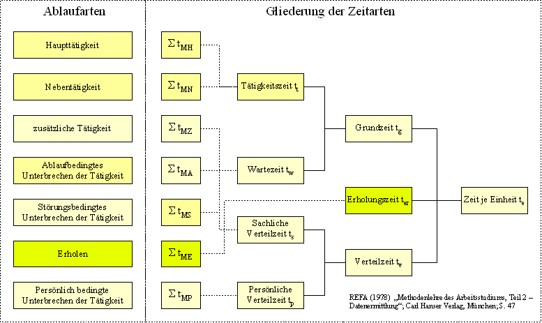 Gliederung der Zeitarten für den Menschen